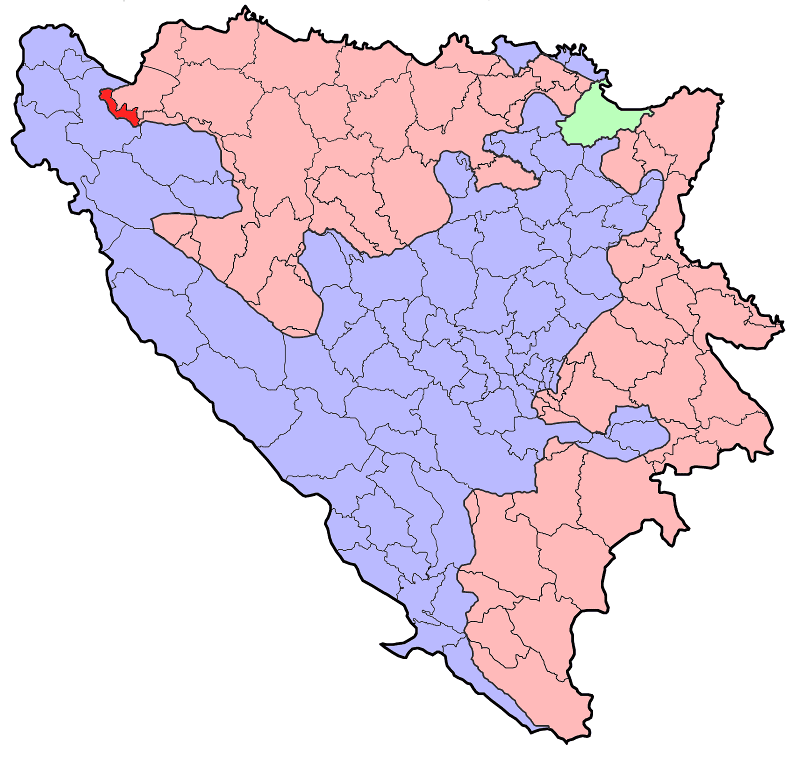 Republika Srpska (BiH) municipality